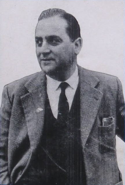 Víctor Vesco, presidente de Rosario Central durante varios períodos, en una imagen de 1971.